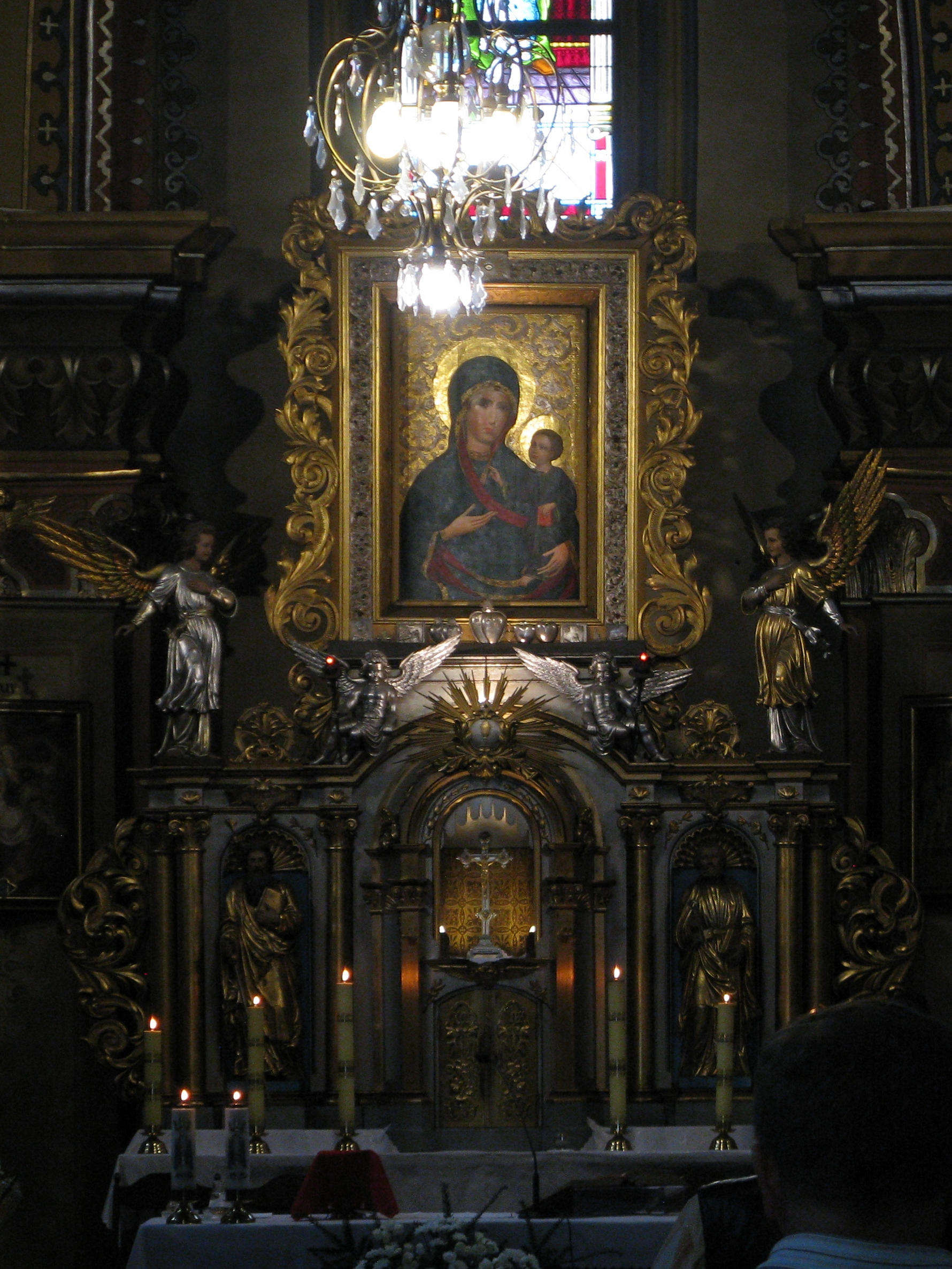 Ołtarz w kościele Narodzenia Najświętszej Maryi Panny w Mysłowicach, w centrum Matka Boska Mysłowicka.